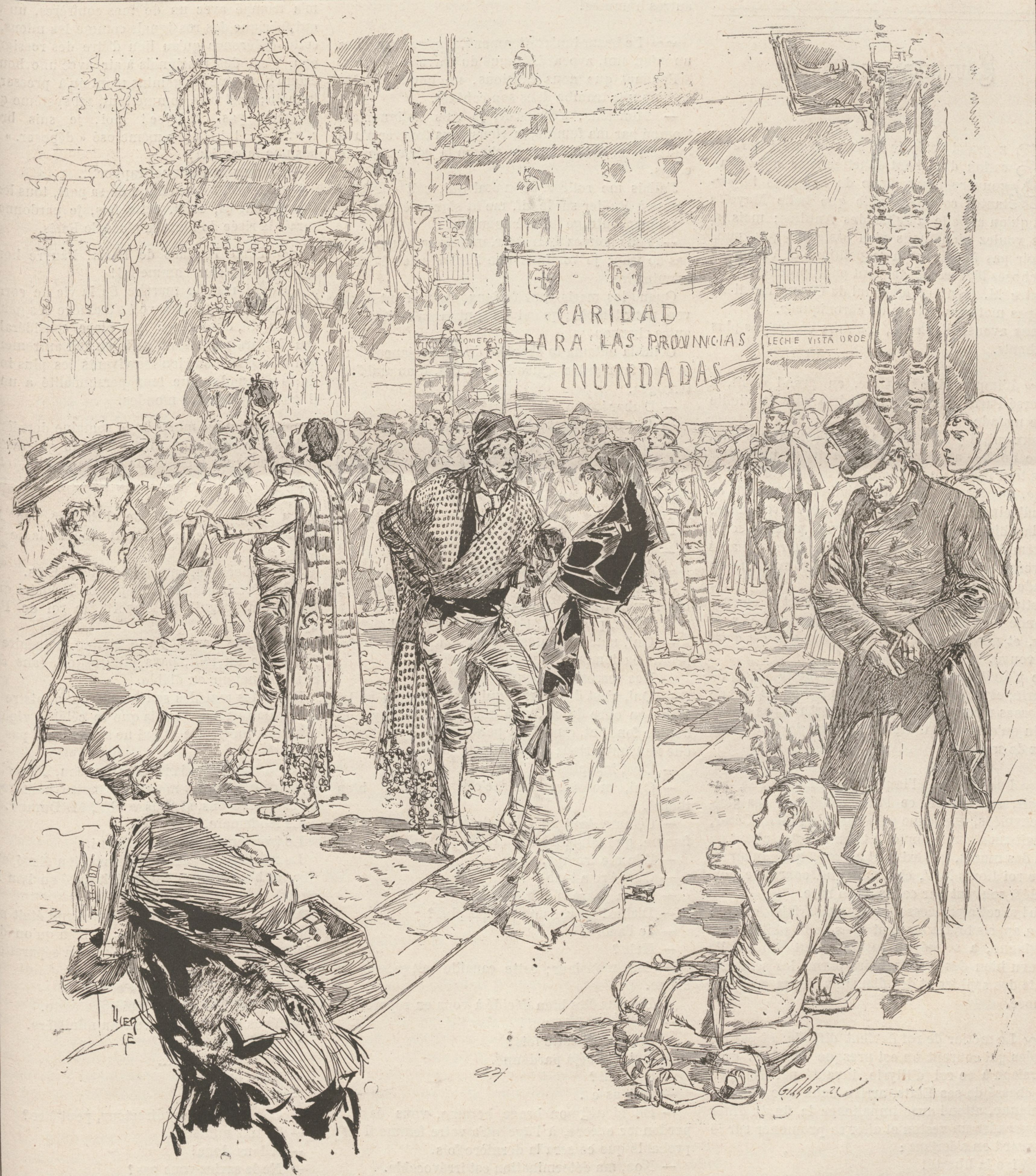 En Espagne. L'Estudiantina murcienne quétant dans les rues de Madrid pour les inondés.